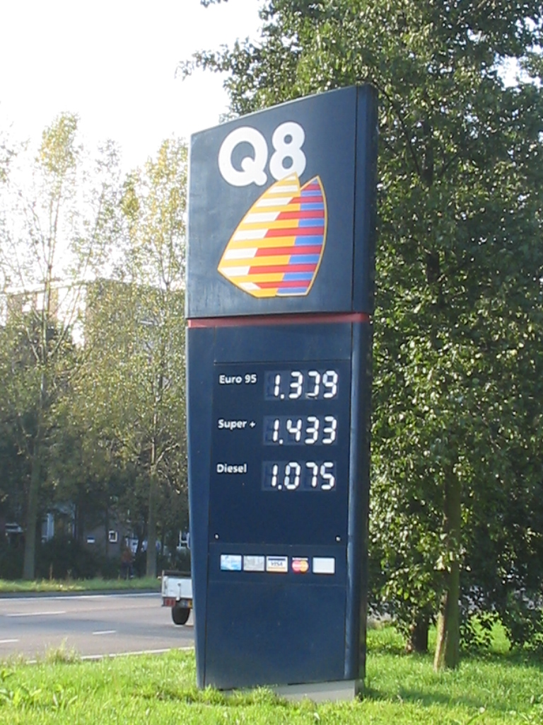 Q8 benzinestation in Delft, 13 oktober 2005